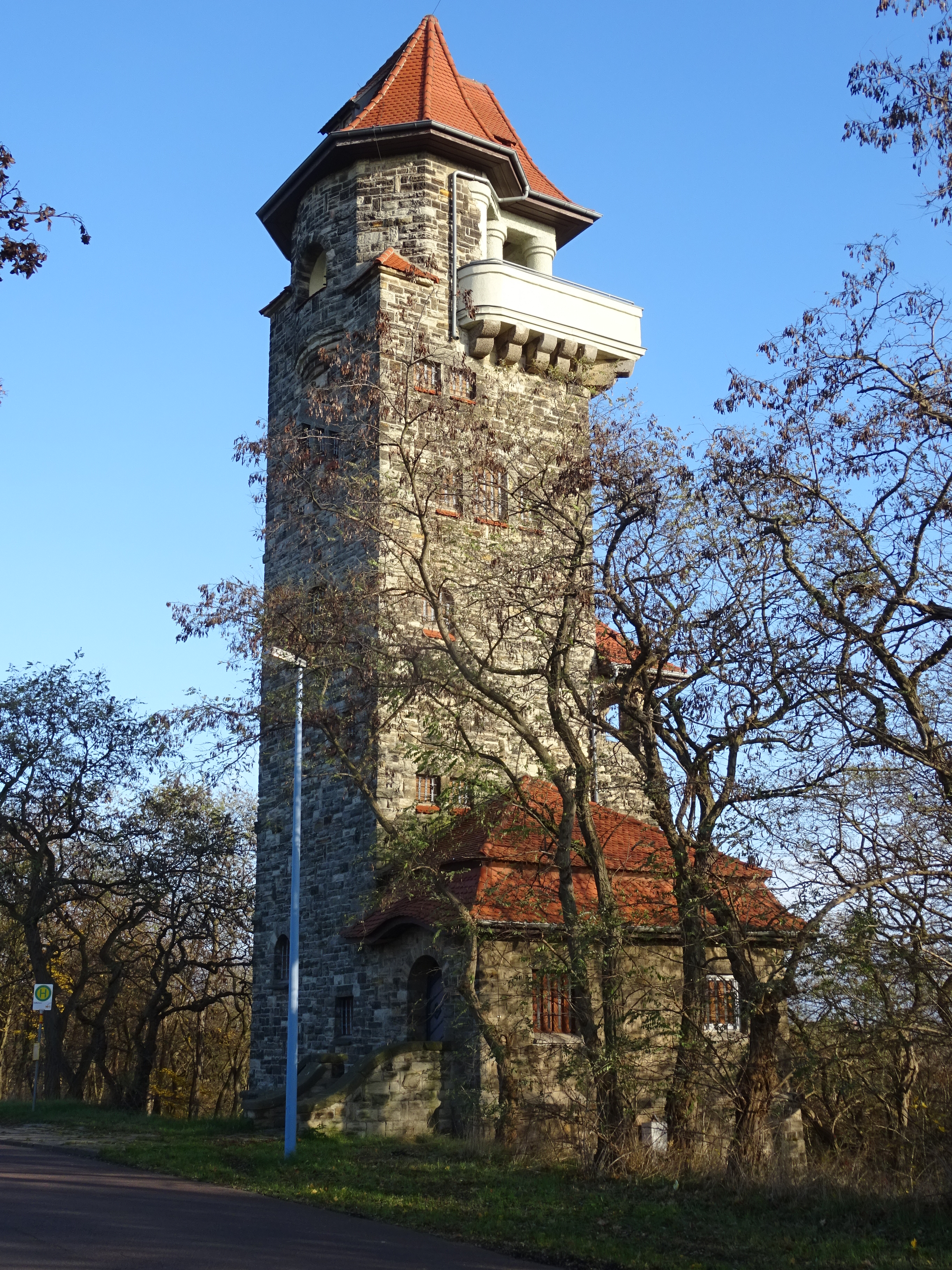 Der Aussichtsturm Keßlerturm in Bernburg (Saale).